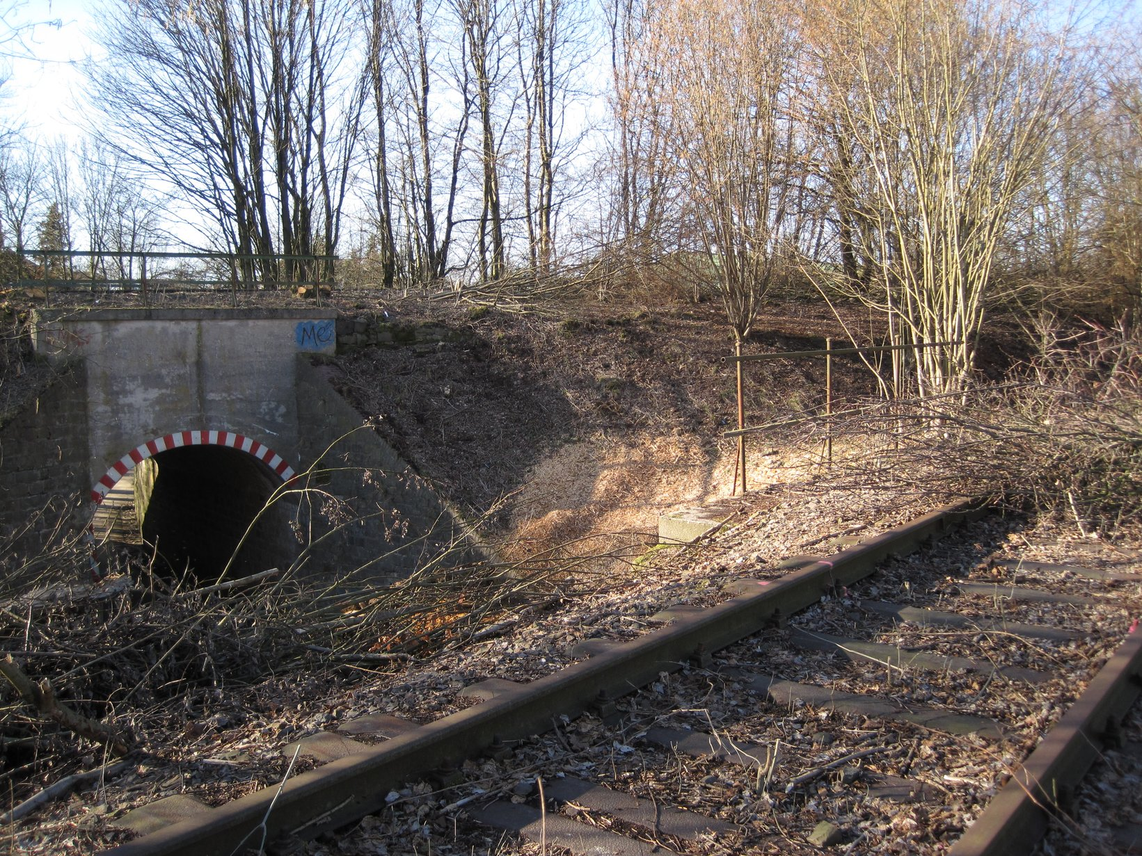 Abzweig Wupperbahn/Wippertalbahn. Blick nach Norden, links Wupperbahn von Wermelskirchen kommend; im Rücken zum Betrachter führt Bahndamm nach Winterhagen.